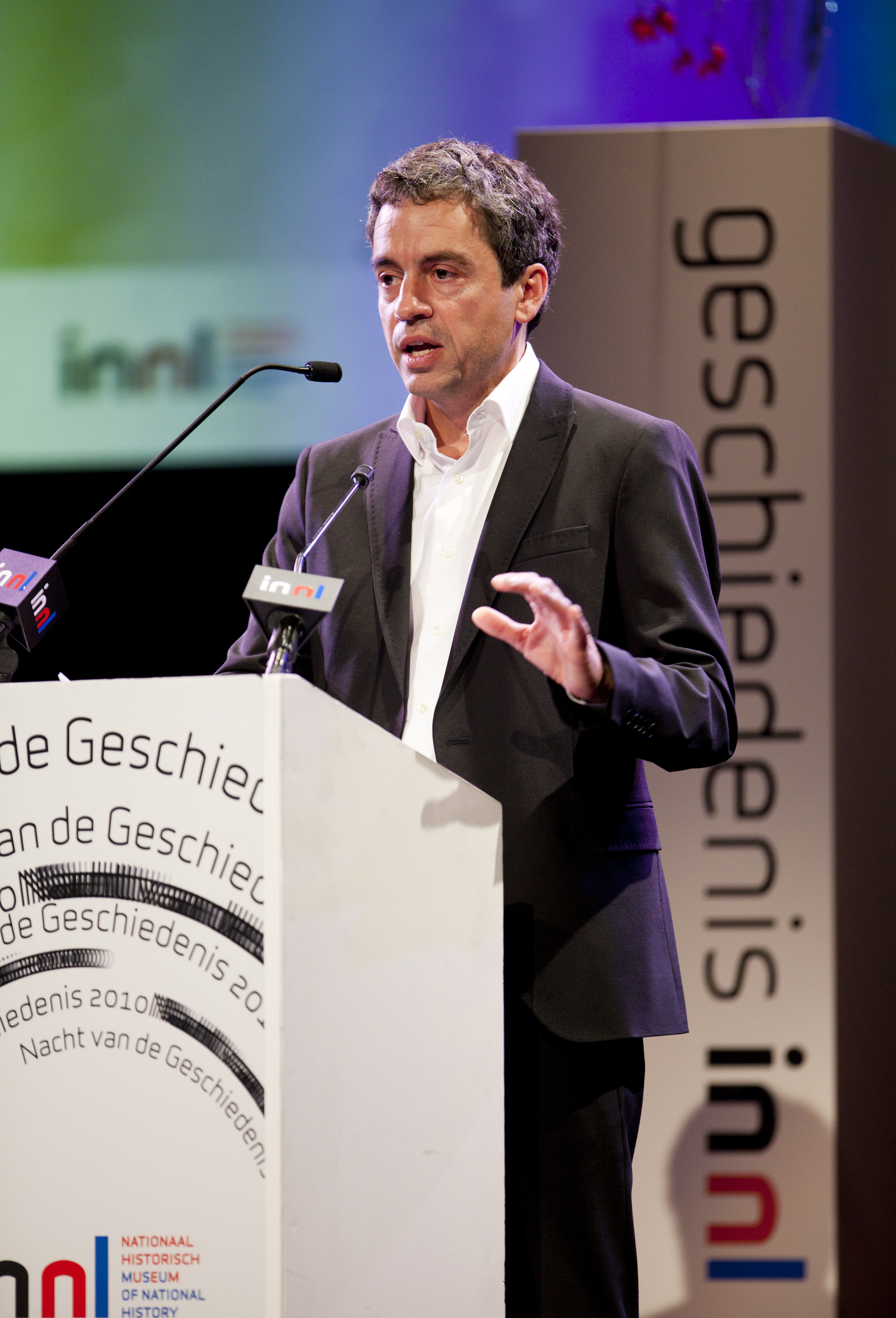 Zaterdag 23 oktober 2010 vond de Nacht van de Geschiedenis plaats in de Amsterdamse Stadsschouwburg. De Nacht is de feestelijke afsluiting van de Week van de Geschiedenis. Ontdek meer op Foto: Fred Ernst